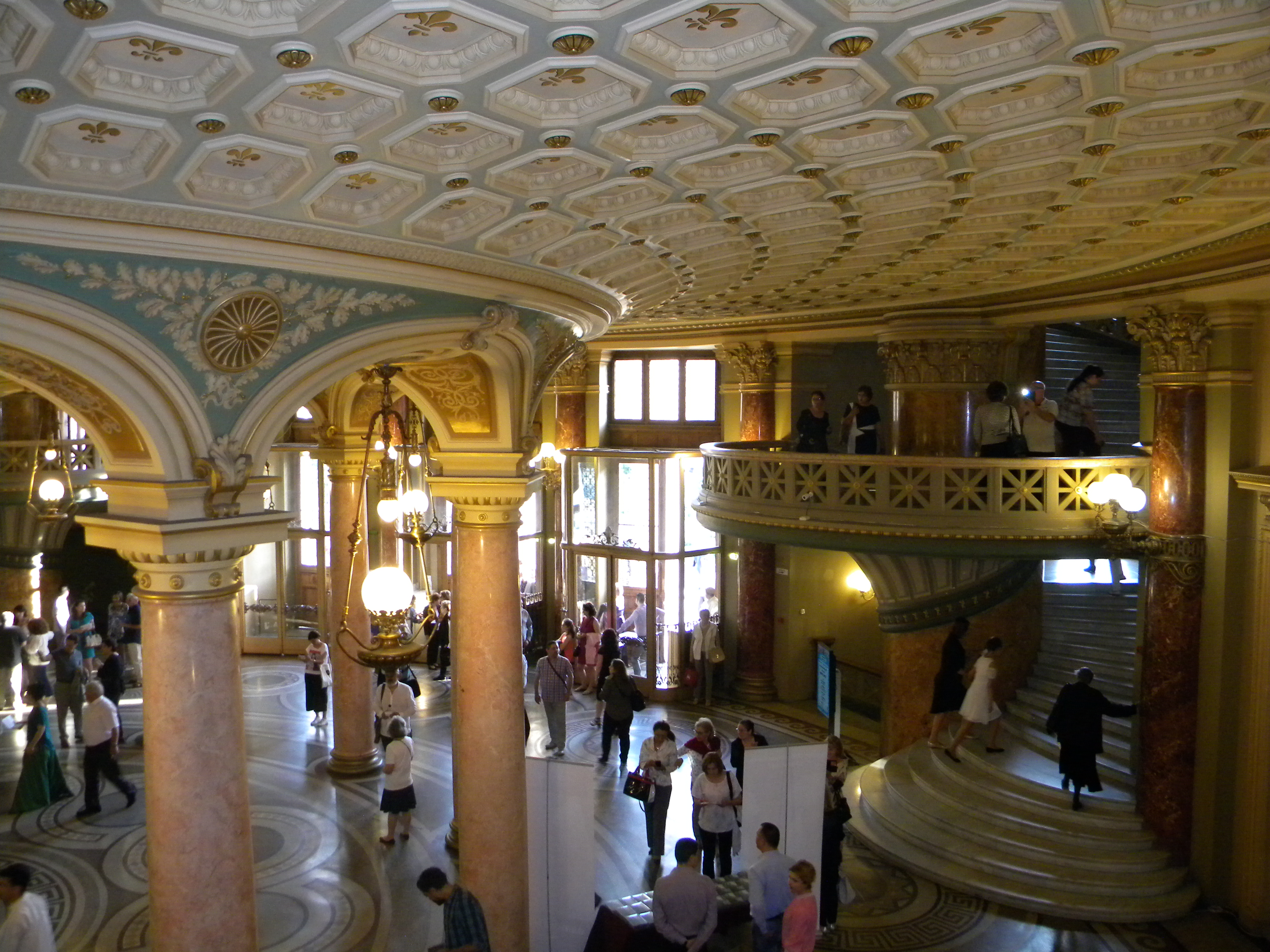 (7) Bucuresti, Romania. Ateneul Roman (10 iunie 2017 (holul de la intrare, vedere de sus)